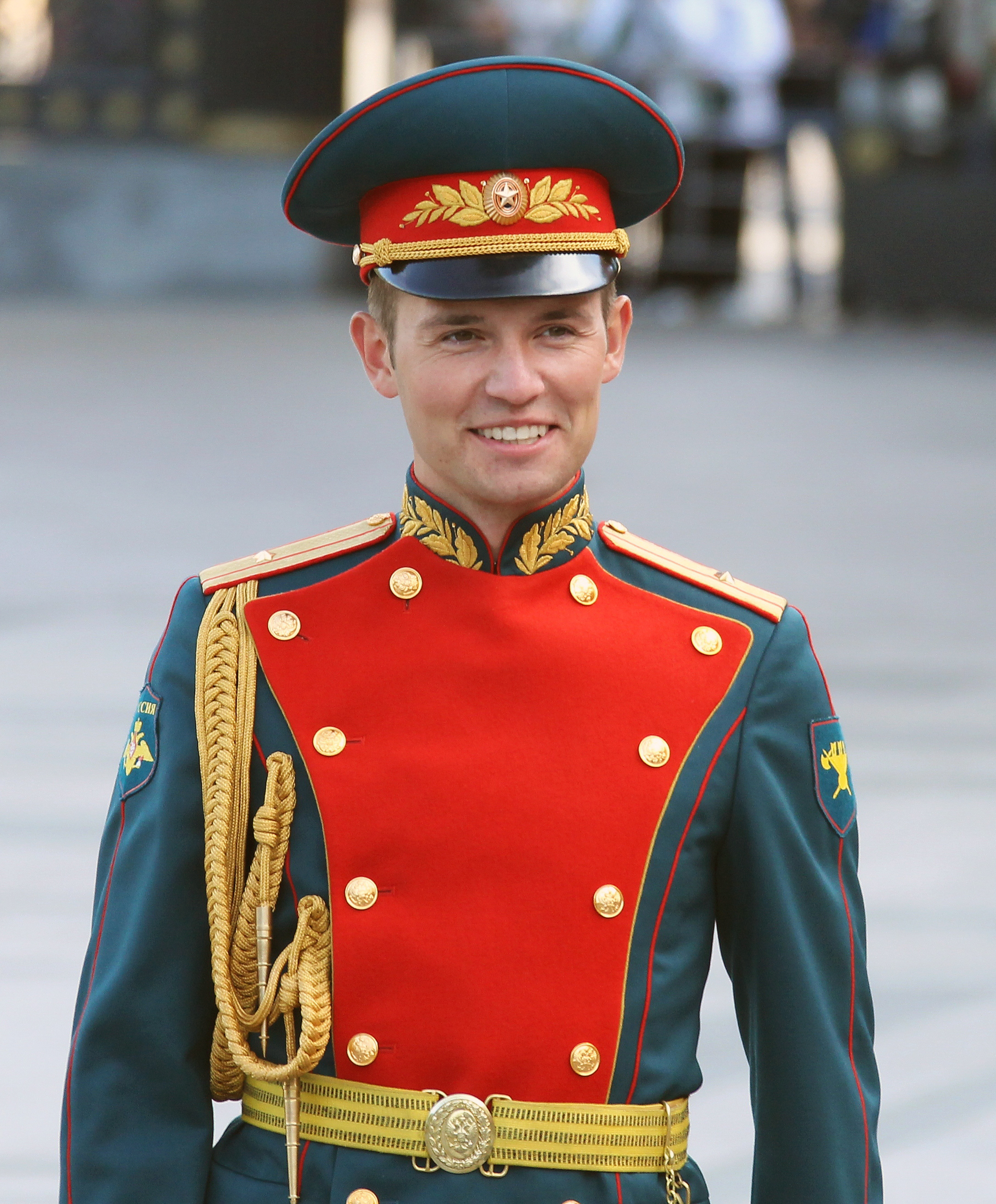 Петрович Константин Андреевич